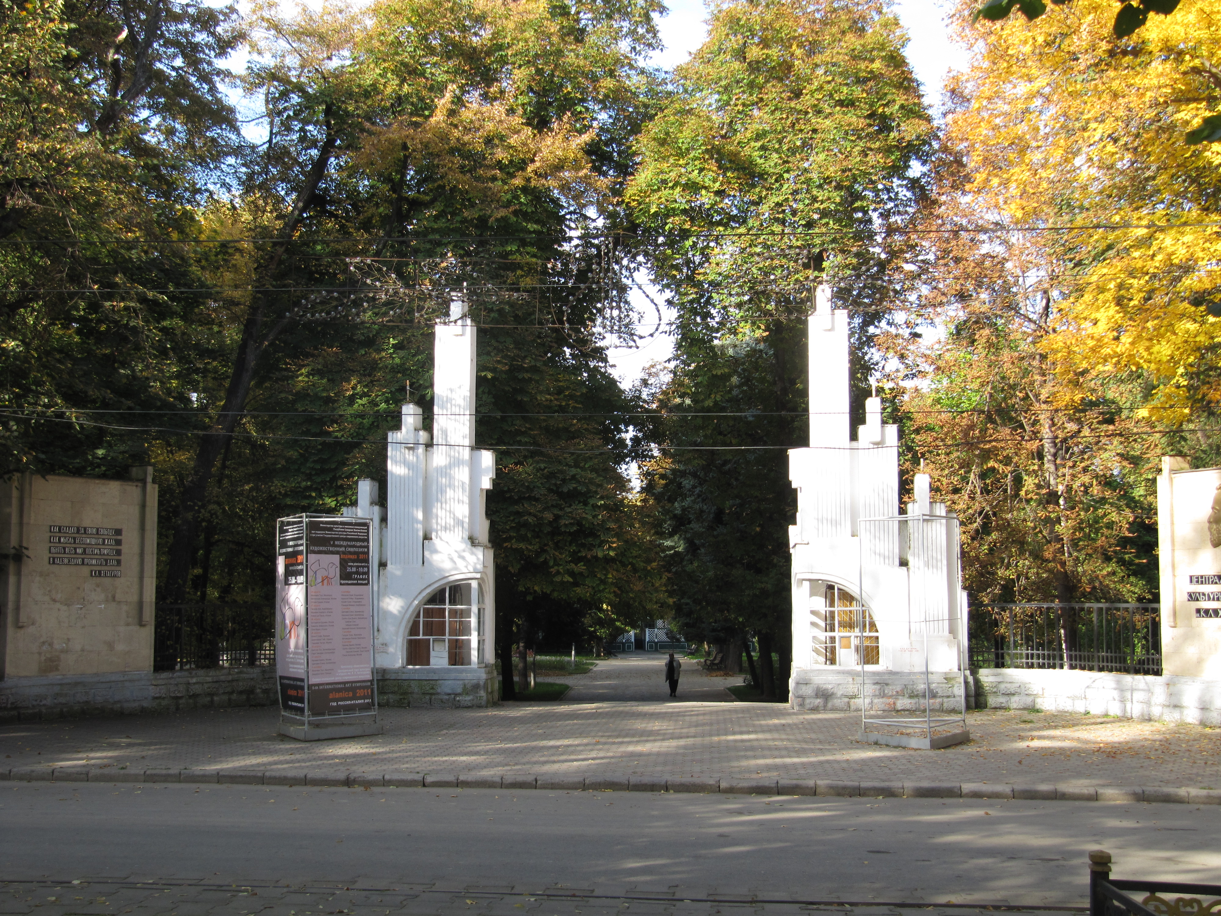 Вход в центральный парк имени Косты Хетагурова, Владикавказ, Северная Осетия